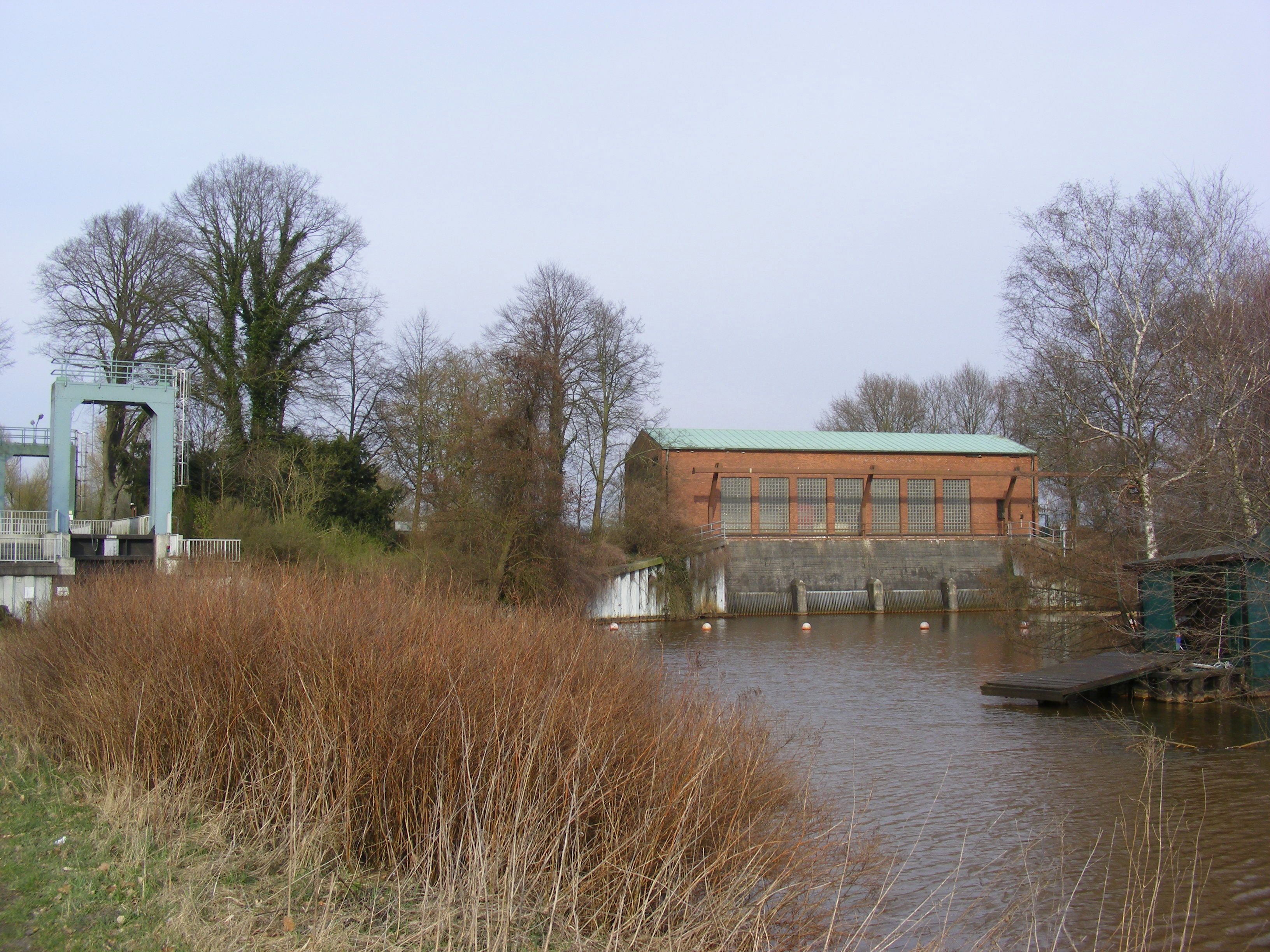 Schöpfwerk und Schleuse Kuhsiel von Süden